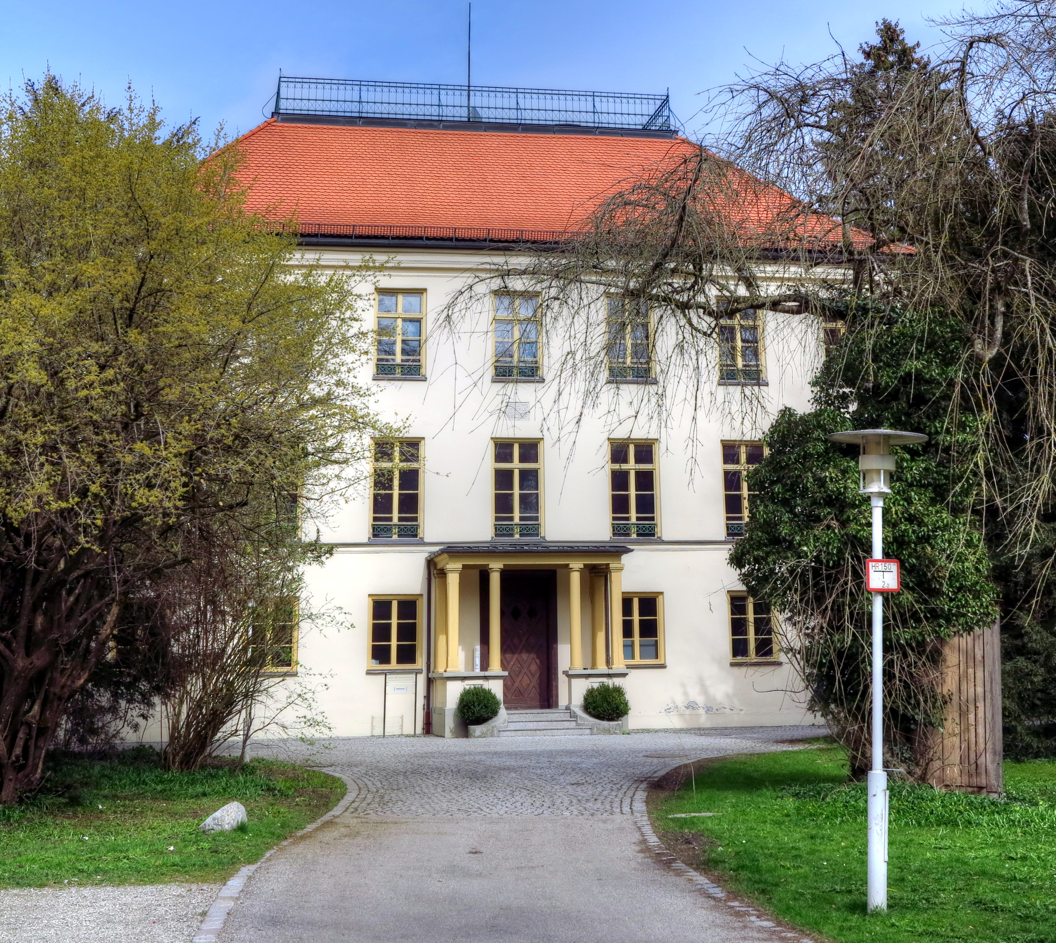 Deutschland, Bayern, Oberbayern, Landkreis Starnberg, Gauting, Schloß Fußberg